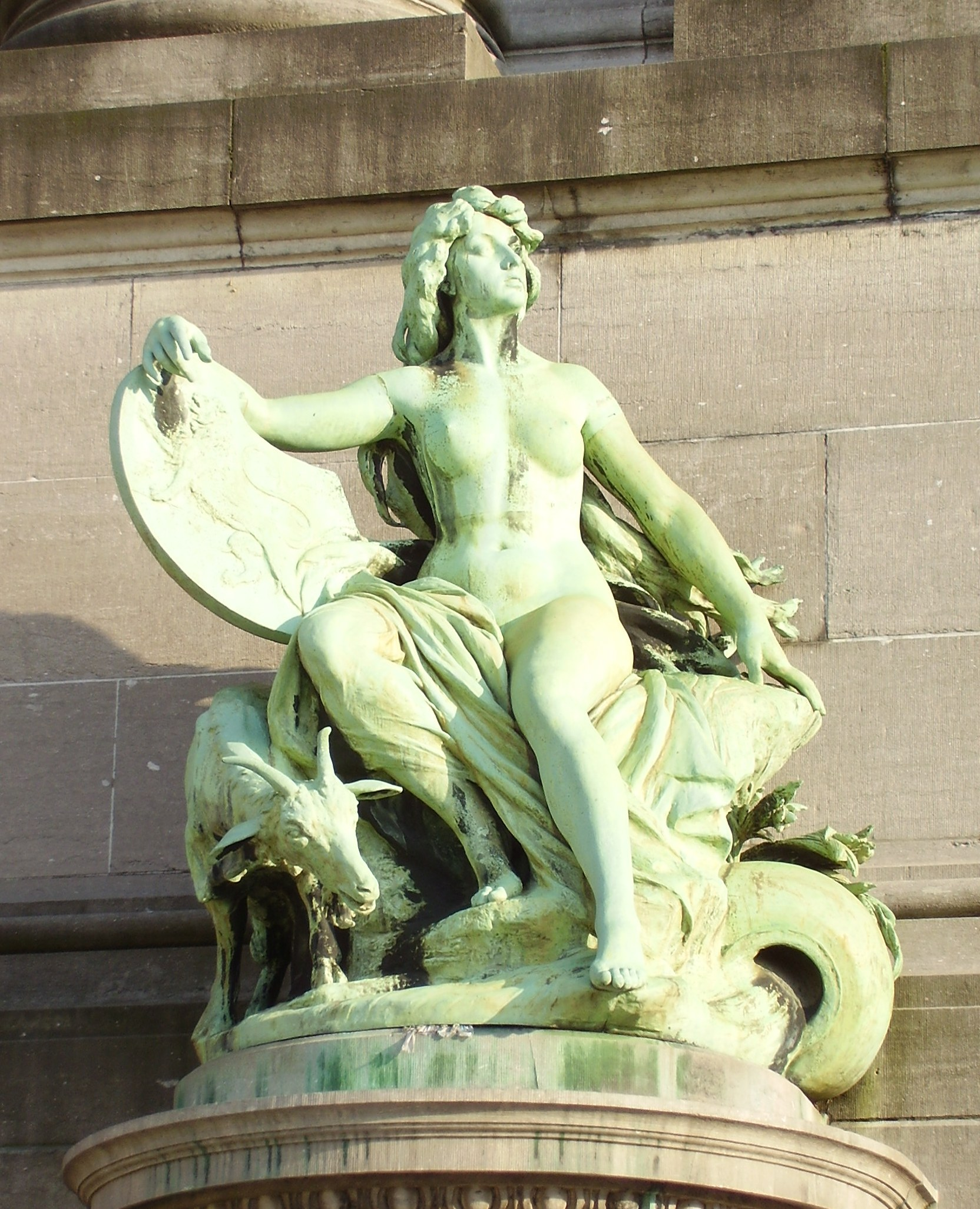 Arcades du Cinquantenaire, Bruxelles - Province de Namur par Guillaume De Groot 1905